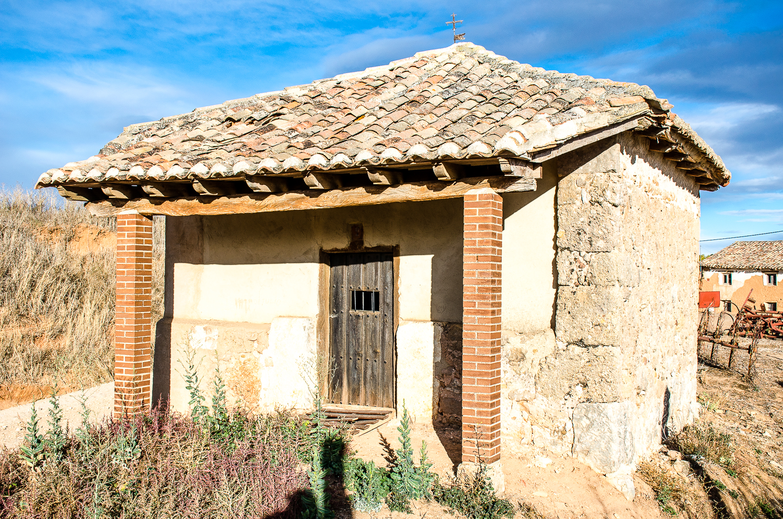 Ermita de San Roque. Sotovellanos (Burgos - España). 2018.